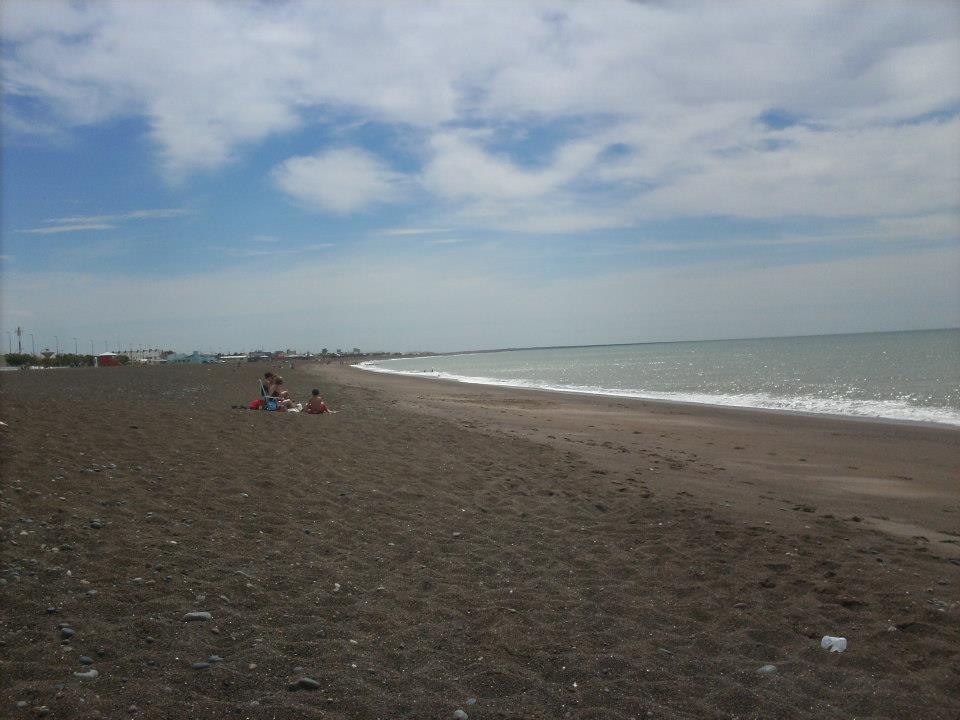 costa de playa union